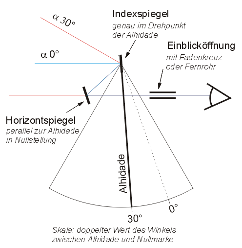 Schemazeichnung Sextant